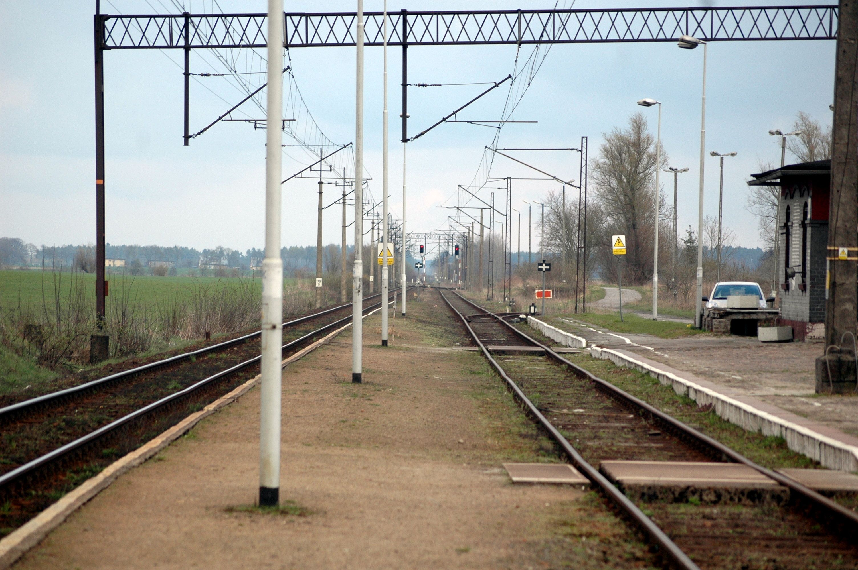 Przystanek kolejowy Wrzosowo we Wrzowowie.